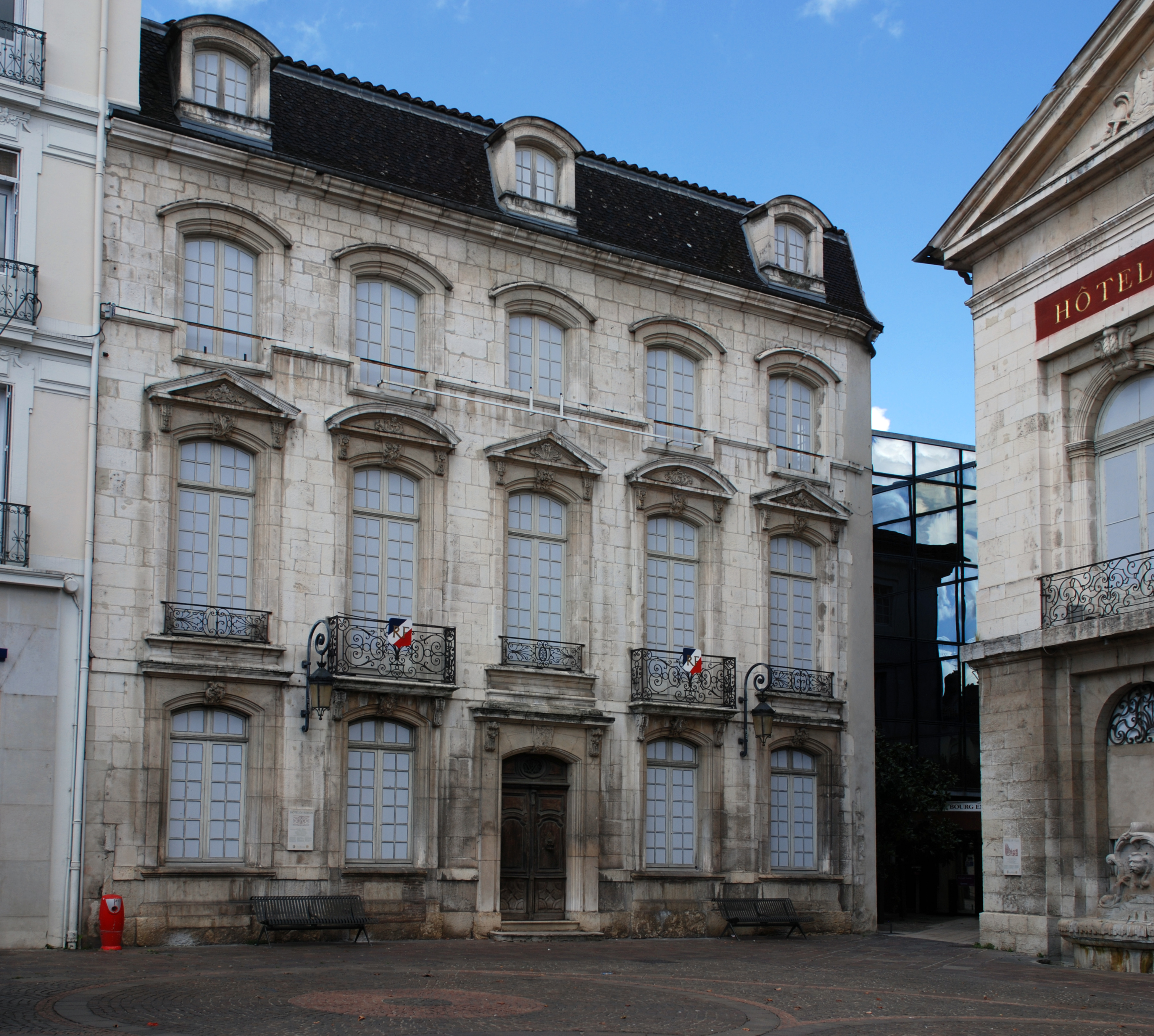 Rathausplatz mit Hôtel de Bohan in Bourg-en-Bresse, (France)